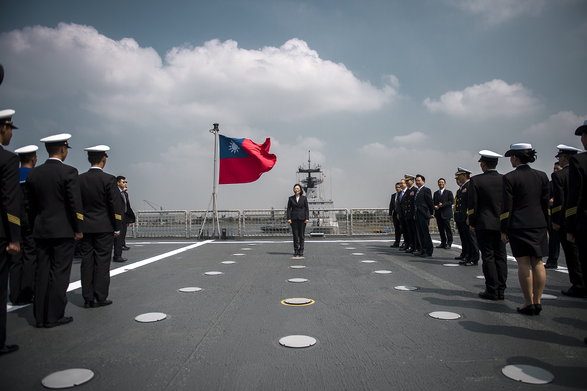 中華民國總統蔡英文出席「海軍106年敦睦支隊啟航歡送暨潛艦國造設計啟動及合作備忘錄簽署」，於磐石軍鑑飛行甲板上向列隊官兵表達祝福。